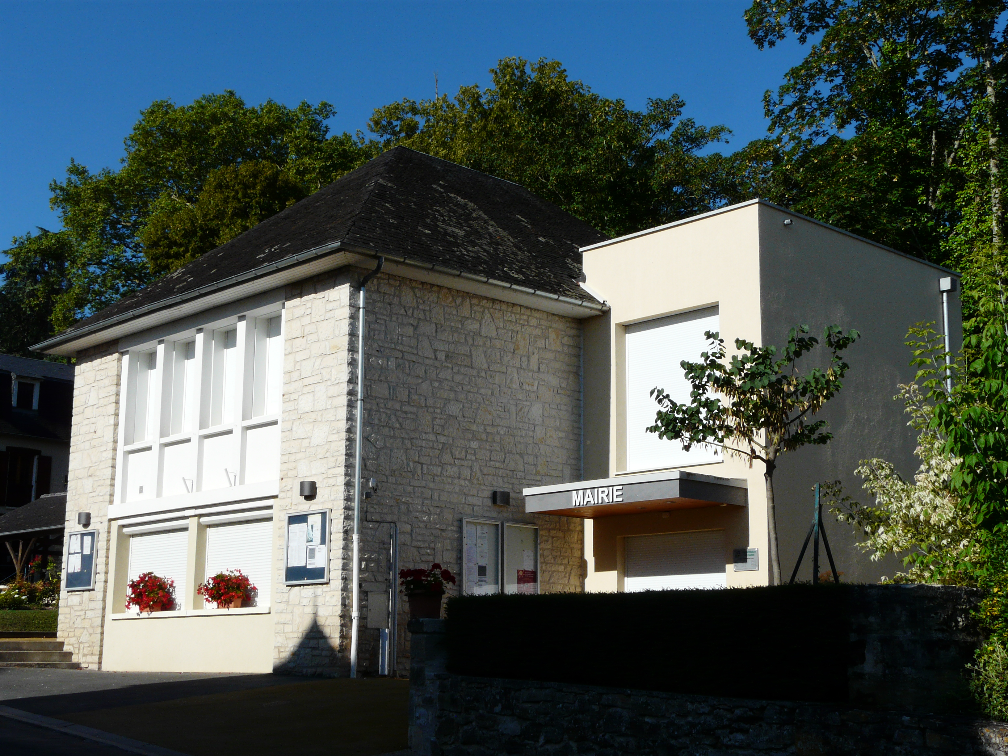 La mairie de Pazayac, Dordogne, France.